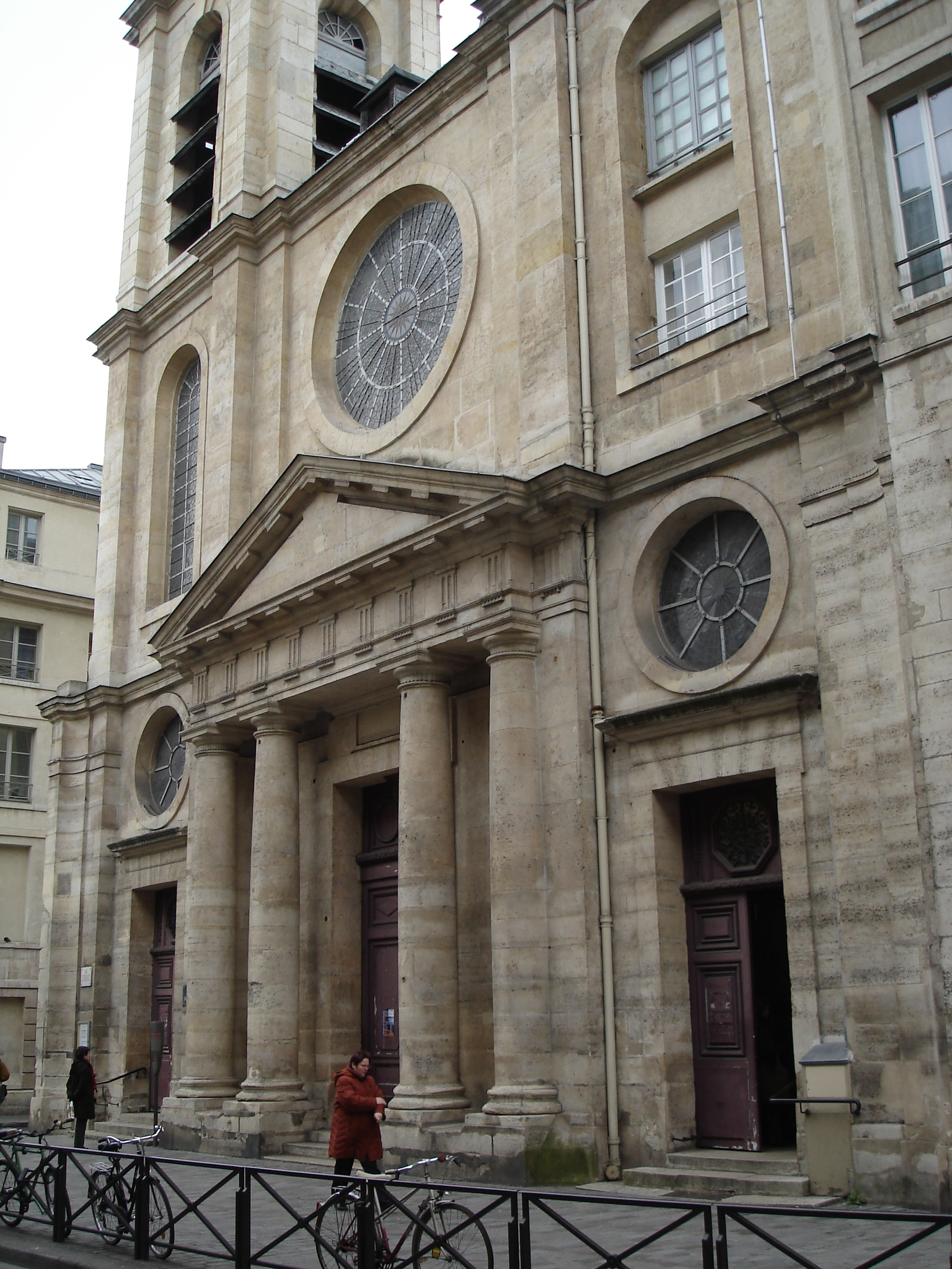 Church:Saint-Jacques-du-Haut-Pas (rue saint-Jacques - Paris Ve arrondissement). Exterior of the church